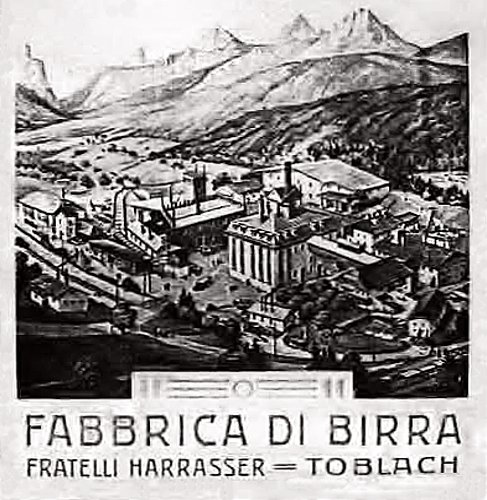 Fabbrica birra Dobbiaco